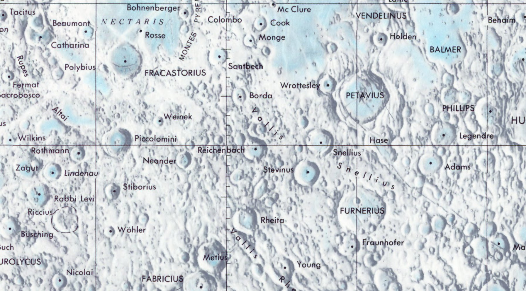 Cráter lunar Reichenbach. Localización. (Lunar Chart LPC1. Second Edition)